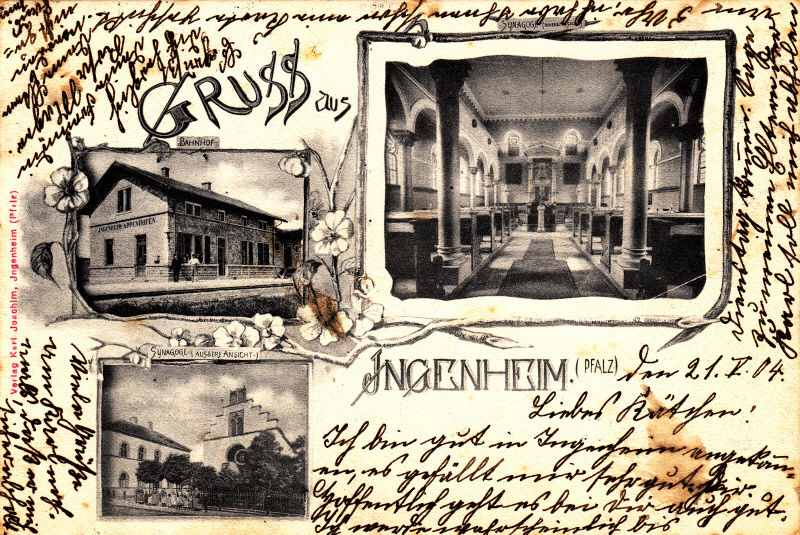 Postkarte von Ingenheim im Jahr 1904